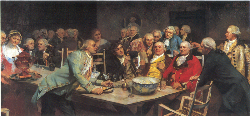 Servitrisen Karen Bach til venstre med samovar, Claus Fasting i grønn silkedress, Madam Juel bak ham, Johan Herman Wessel sitter med hevet glass, i bakgrunnen står de tre brødrene Jakob Edvard Colbjørnsen, Christian Colbjørnsen og Edvard Røring Colbjørnsen, Knud Lyne Rahbek lener seg frem over Wessel i rosa frakk, bak ham baron Fredrik Christian Otto Wedel Jarlsberg, Søren Monrad sitter og leser høyt fra ”det bekjente gravskriftet” over Ove Gjerløw Meyer, i rød frakk sitter Niels Krog Bredal, bak ham i døråpningen ser vi Johan Nordahl Brun i profil, lent over stolen står selskabets sekretær Johan Vibe (1748-1782), helt til høyre skåler klubbens første formann Ove Gjerløw Meyer.